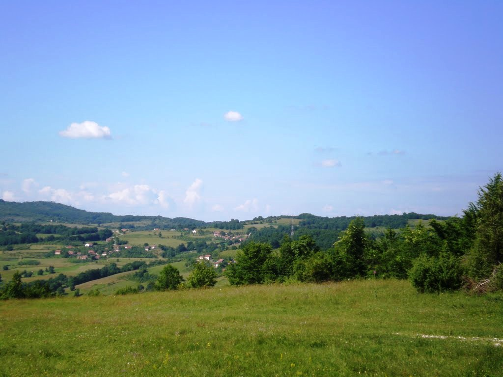 Pogled na Šehovce sa Dugih njiva, opština Mrkonjić Grad.